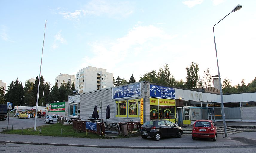 Vantaanpuiston ostoskeskus Vantaalla.Taustalla Vantaanpuiston tornitaloja. Huom: Muista säilyttää viittaus kuvaajaan, mikäli käytät kuvaa.